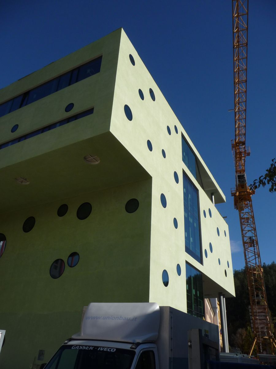 Neubau der Stadt- und Universitätsbibliothek Bruneck